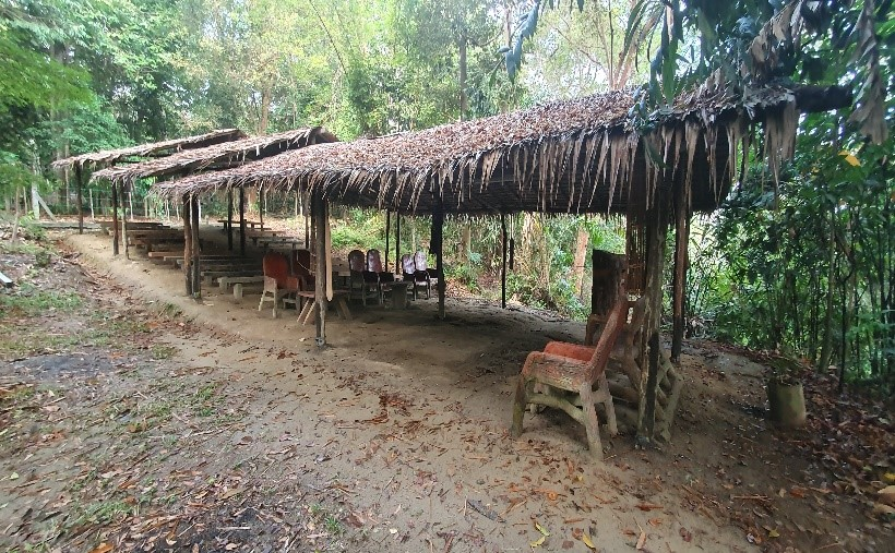 Dewan digunakan di perkampungan ikhtiar hidup